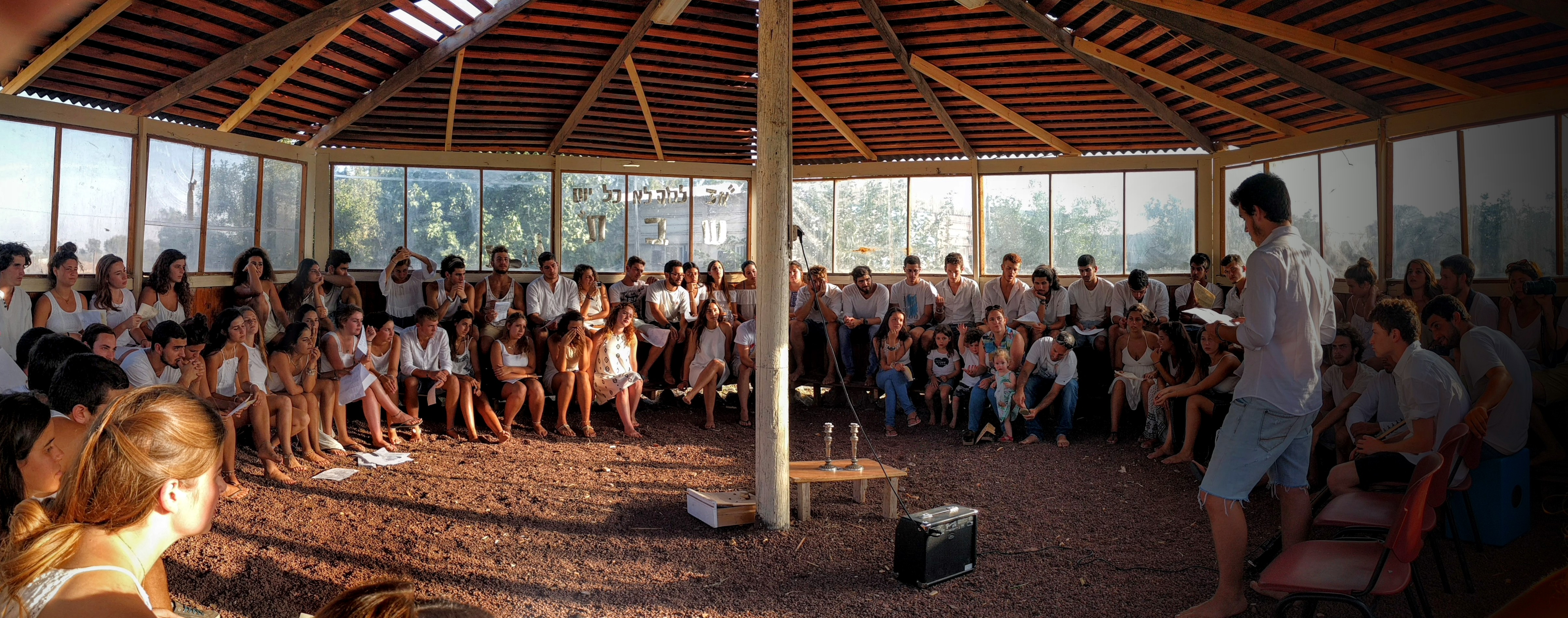 תמונה במהלך קבלת שבת במכינה